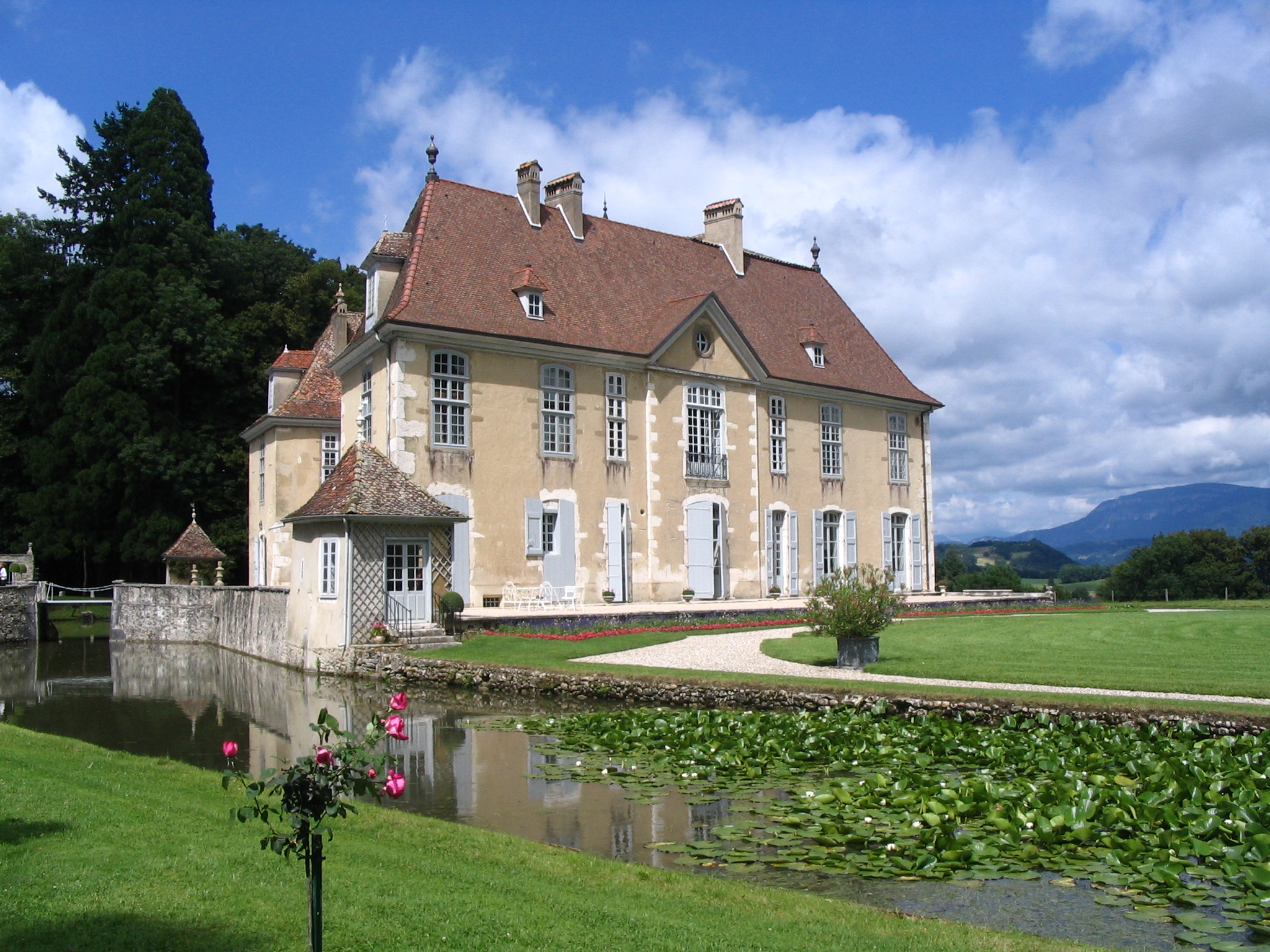 Château de Longpra, Saint-Geoire-en-Valdaine, Isère, France